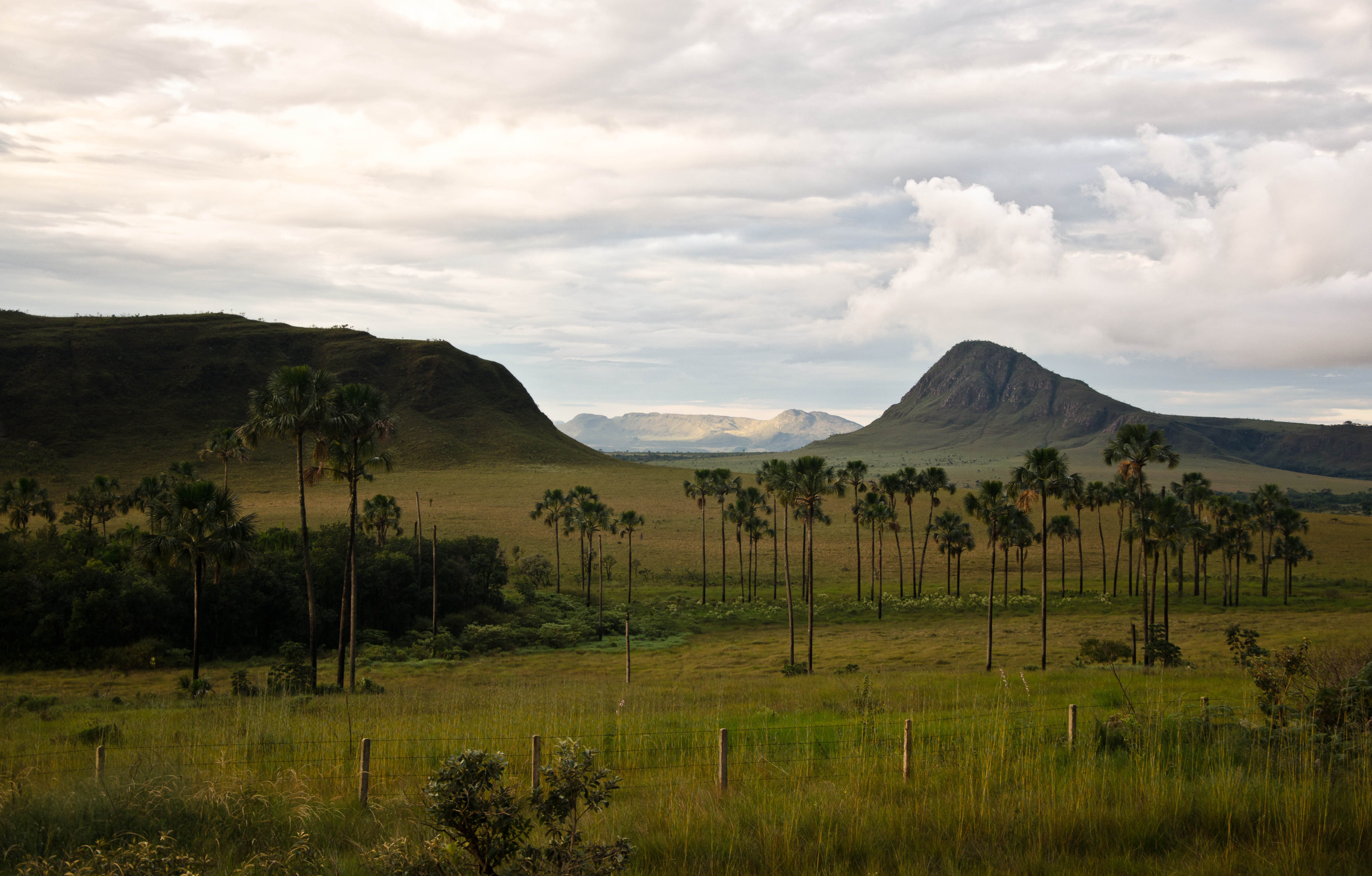 Saída da cidade de São Jorge